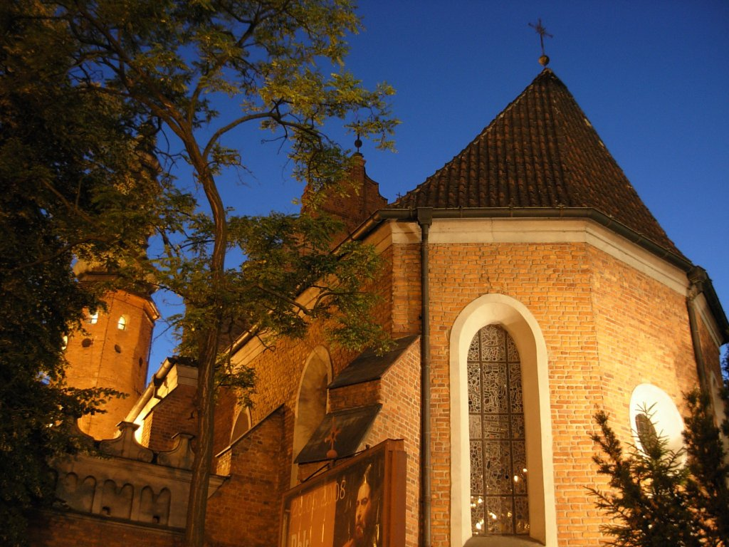 Prezbiterium kościoła klarysek w Bydgoszczy